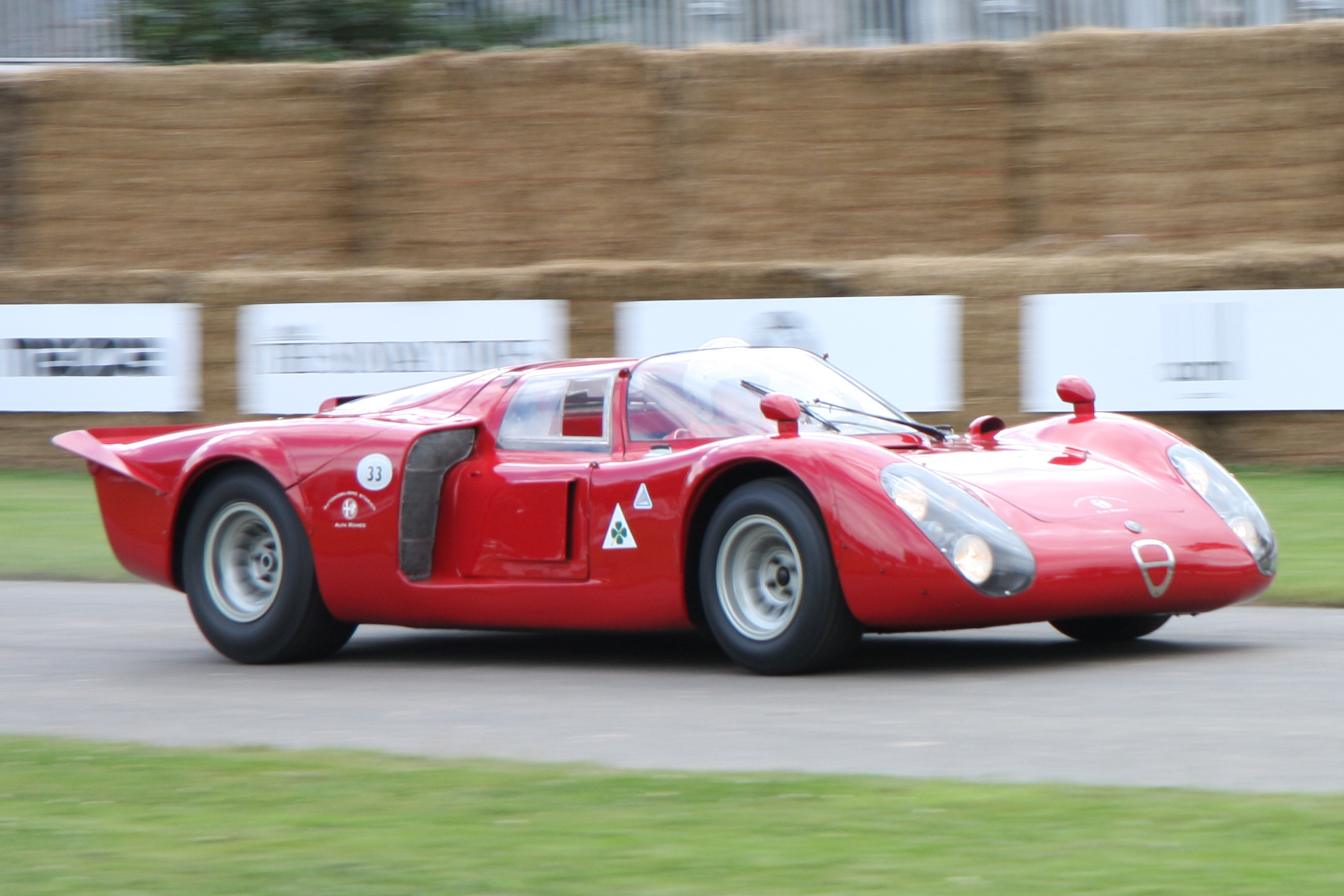 Built 1968. 2 litre V8